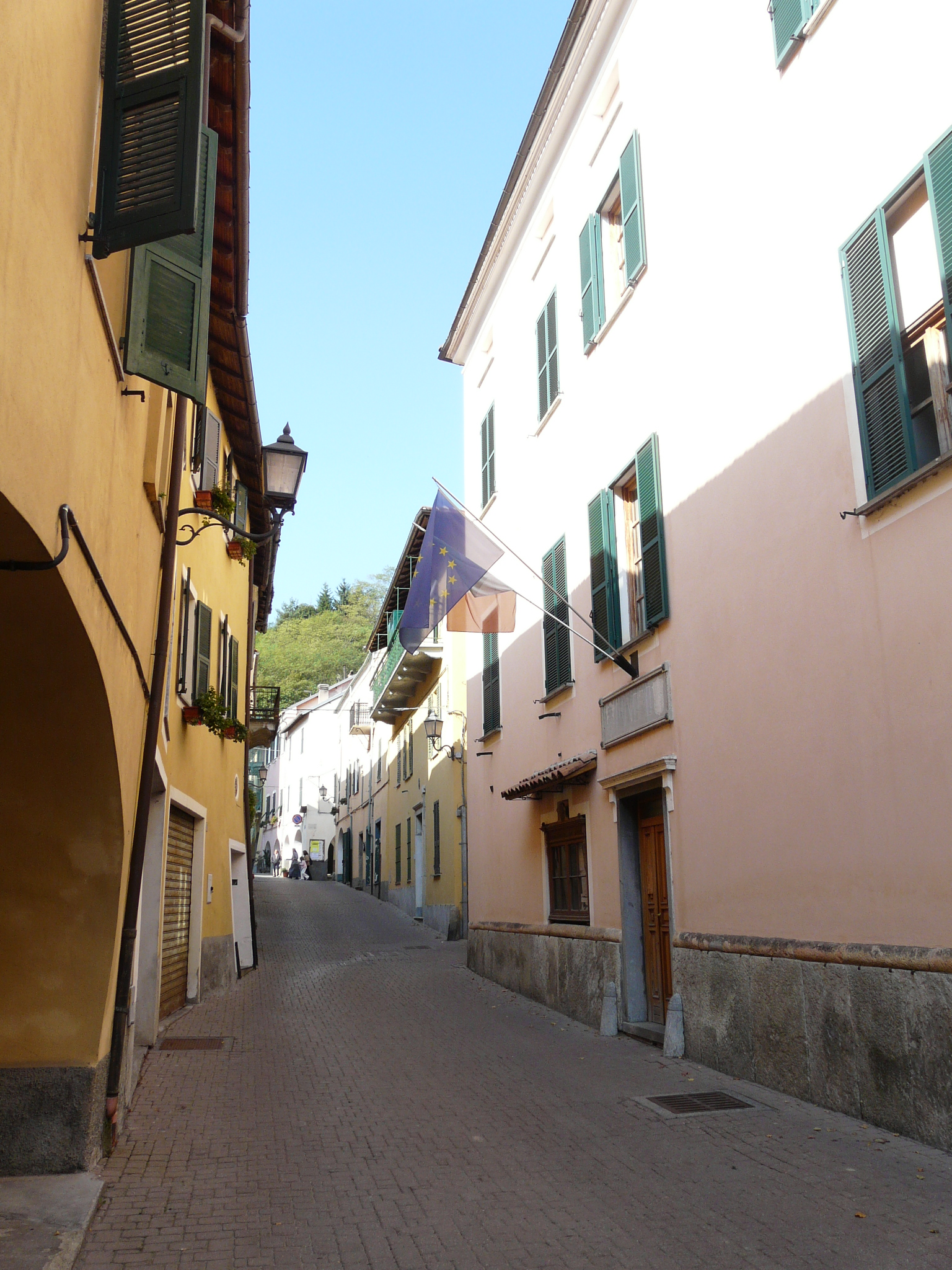 Via del centro storico di Calizzano, Liguria, Italia